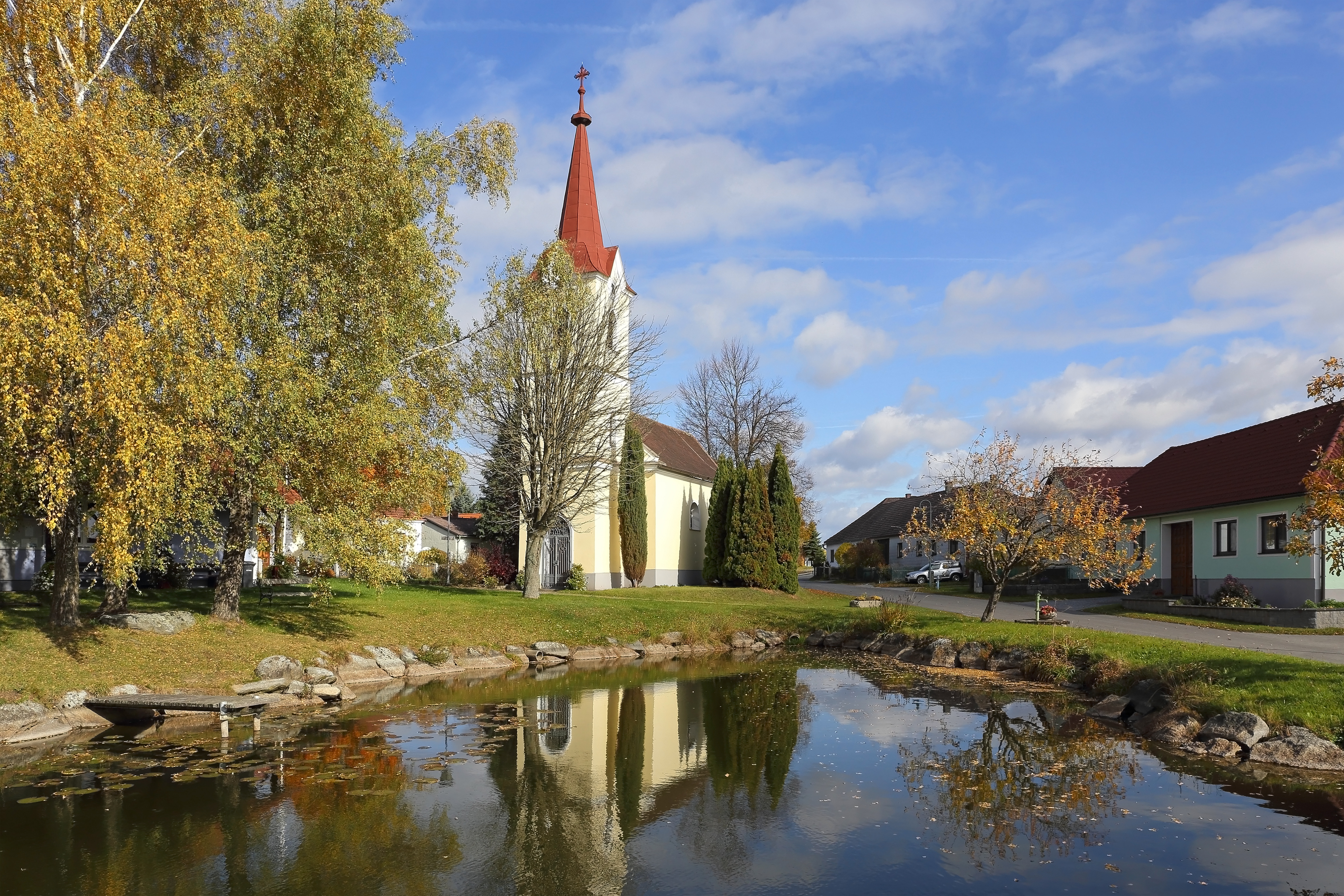 Die am Nordende des Angers von Eulenbach gelegene Ortskapelle hl. Anna ist ein 1734/35 errichteter und 1888 renovierter Barockbau.